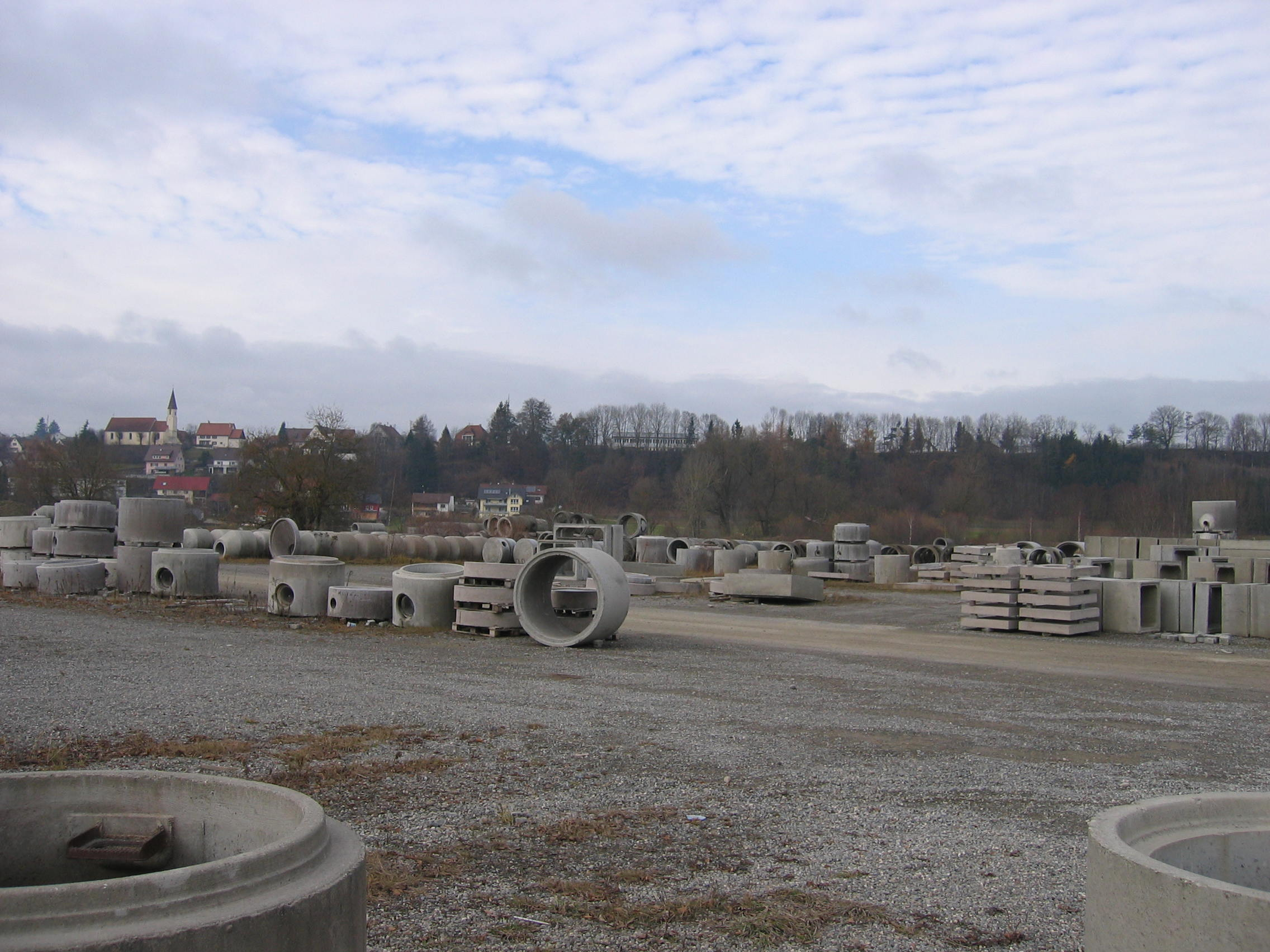 Firma Lutz Beton und Kies in Krauchenwies, Landkreis Sigmaringen